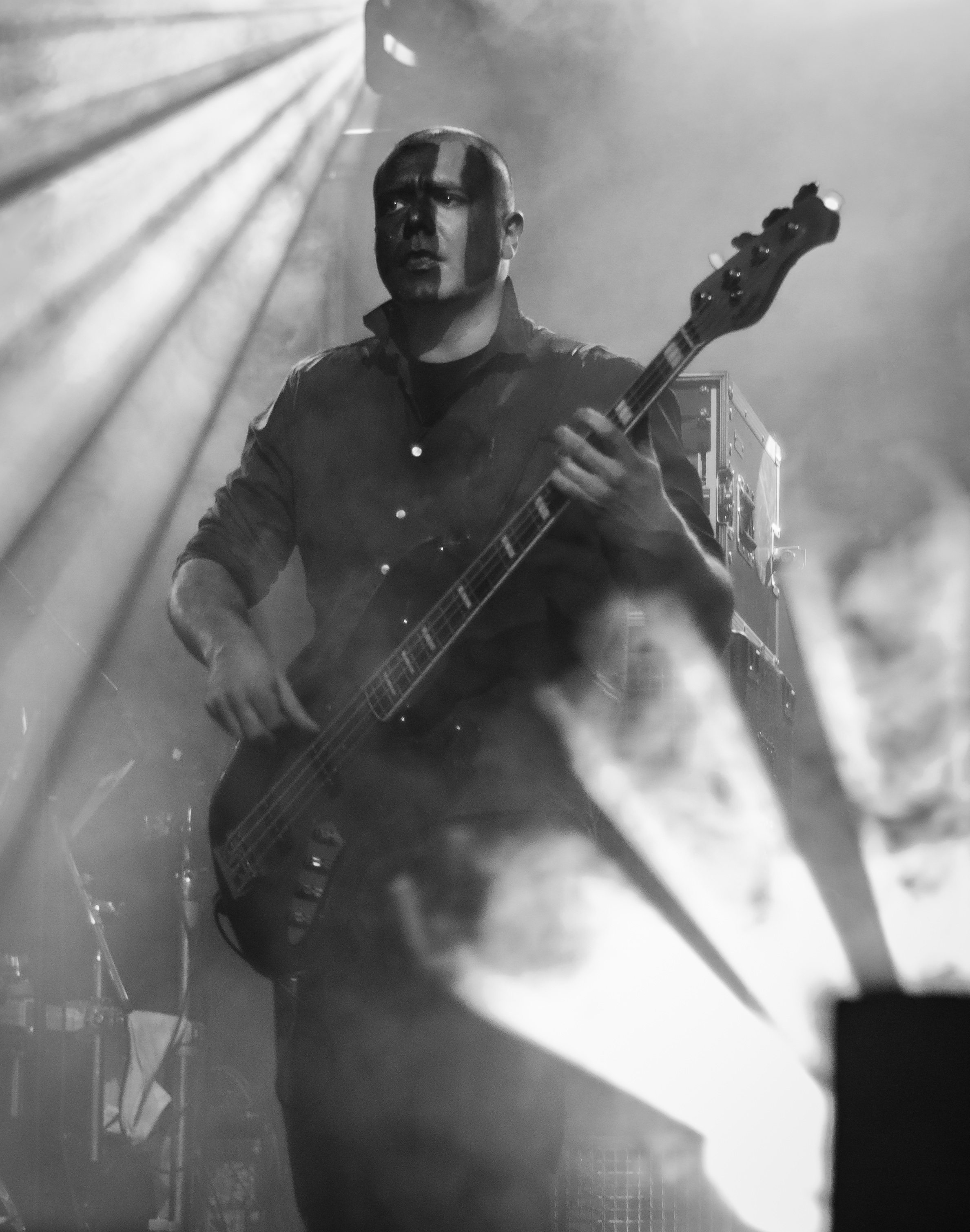 Rafał Matuszak, basista zespołu Coma podczas Rocket Festiwal 2013 w Warszawie.